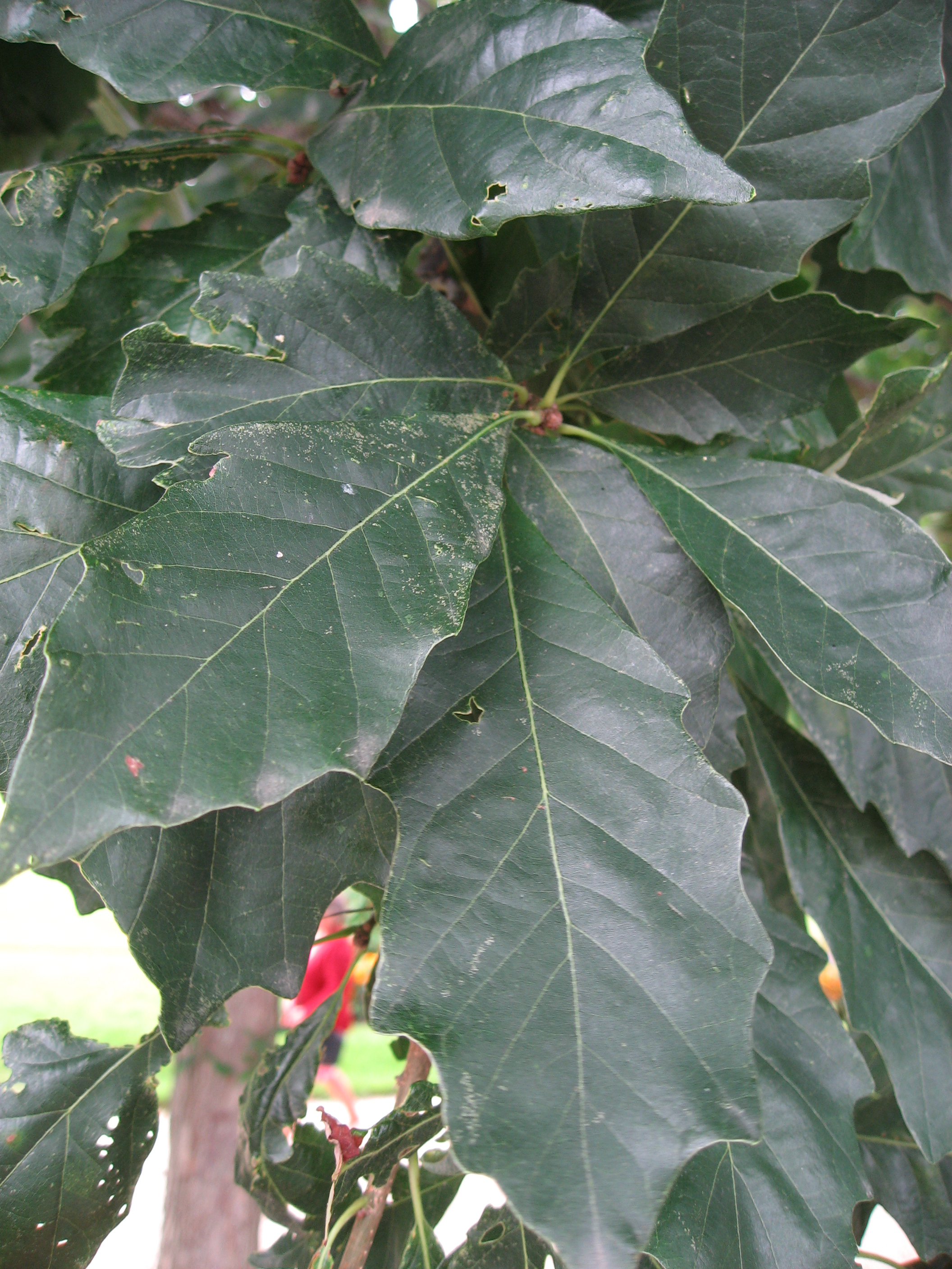 Quercus bicolor in Serres d'Auteuil Map: 48° 50' 49" N 2° 15' 8" E